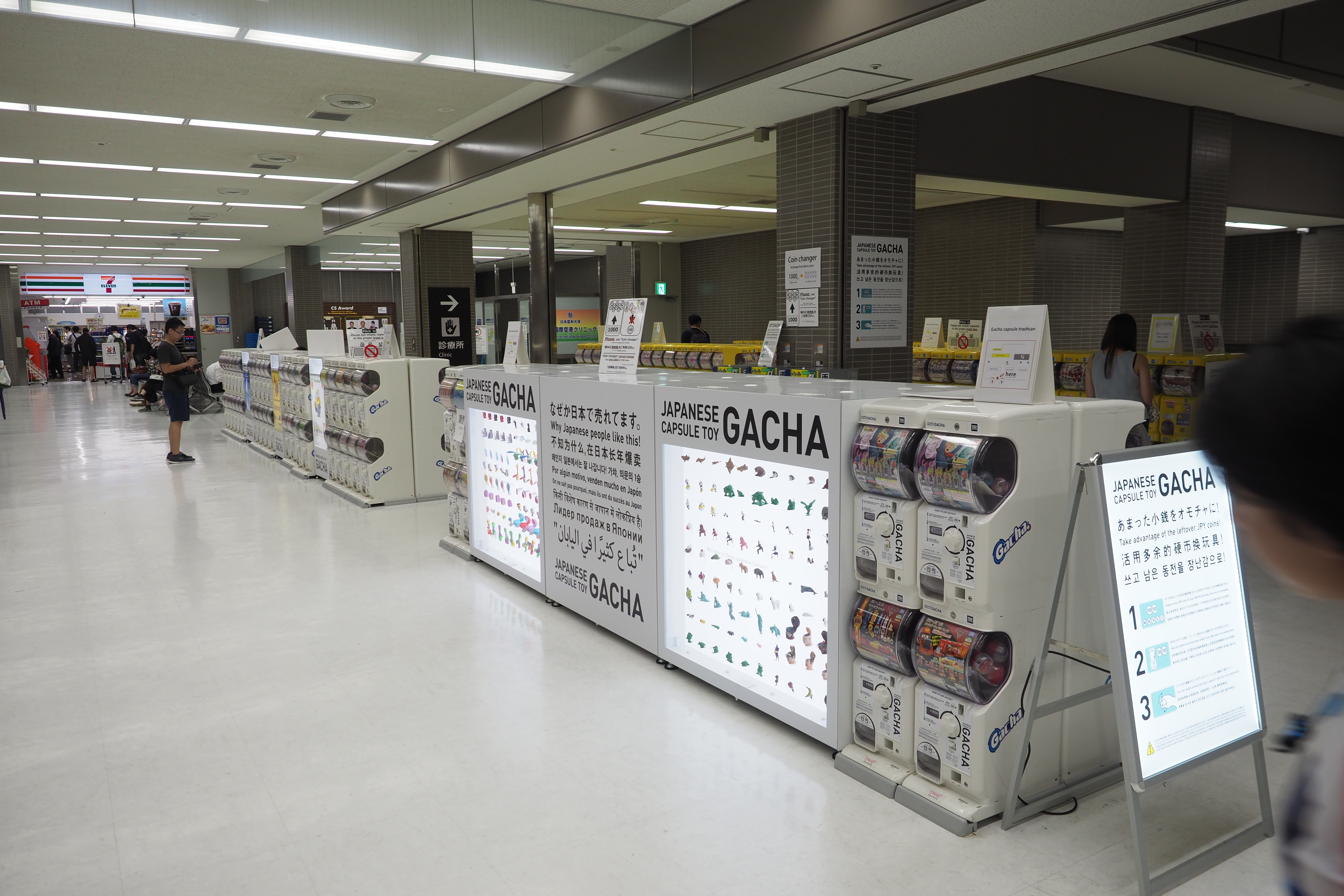 Tokyo